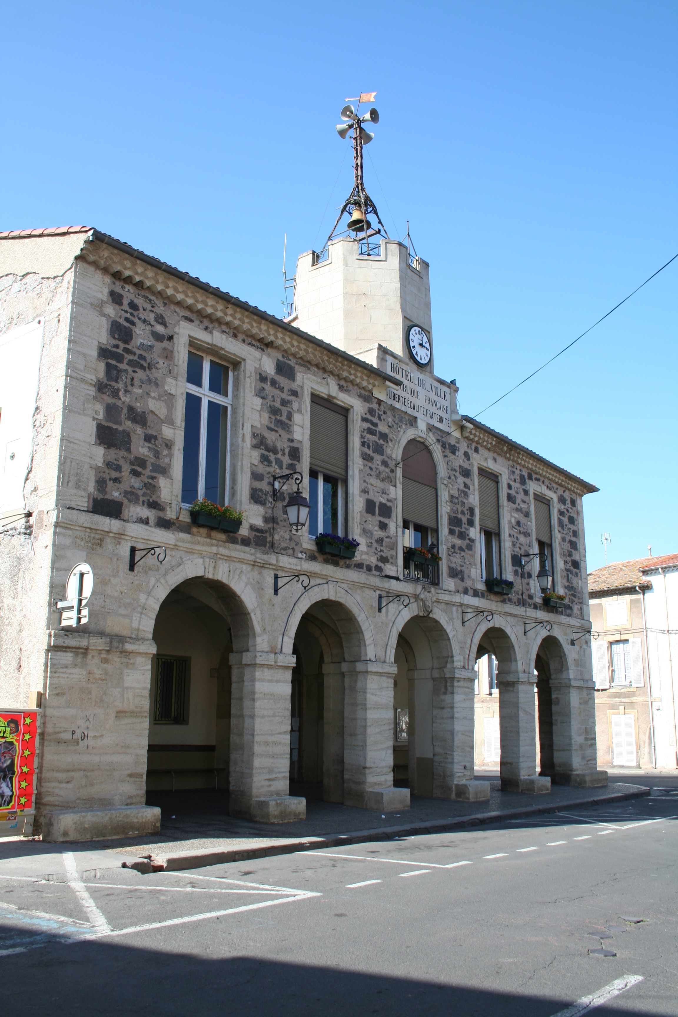 Bessan (Hérault) - mairie.